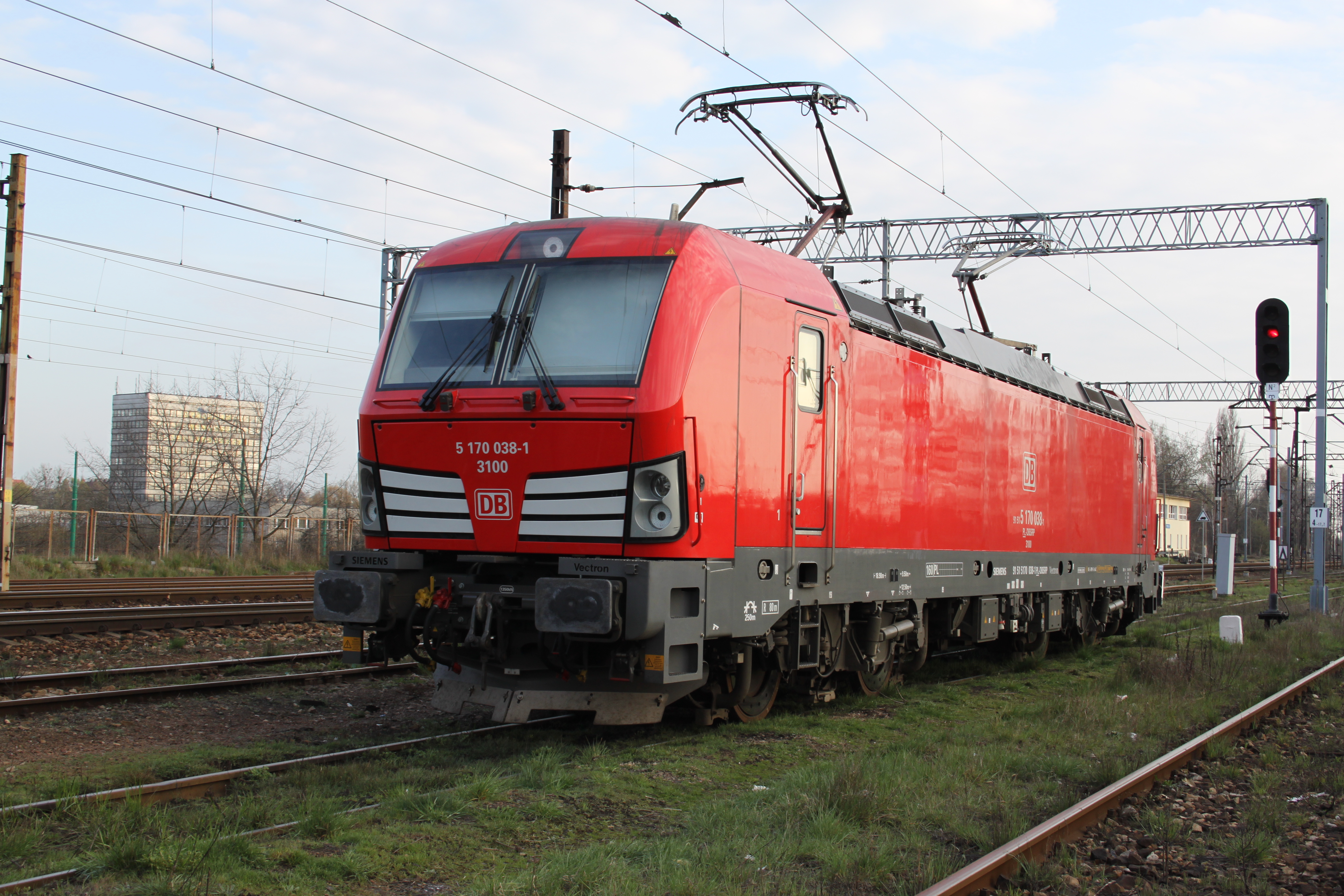 Lokomotywa elektryczna Vectron w malowaniu przewoźnika DB Cargo Polska czeka na zatrudnienie na stacji kolejowej w Tychach.